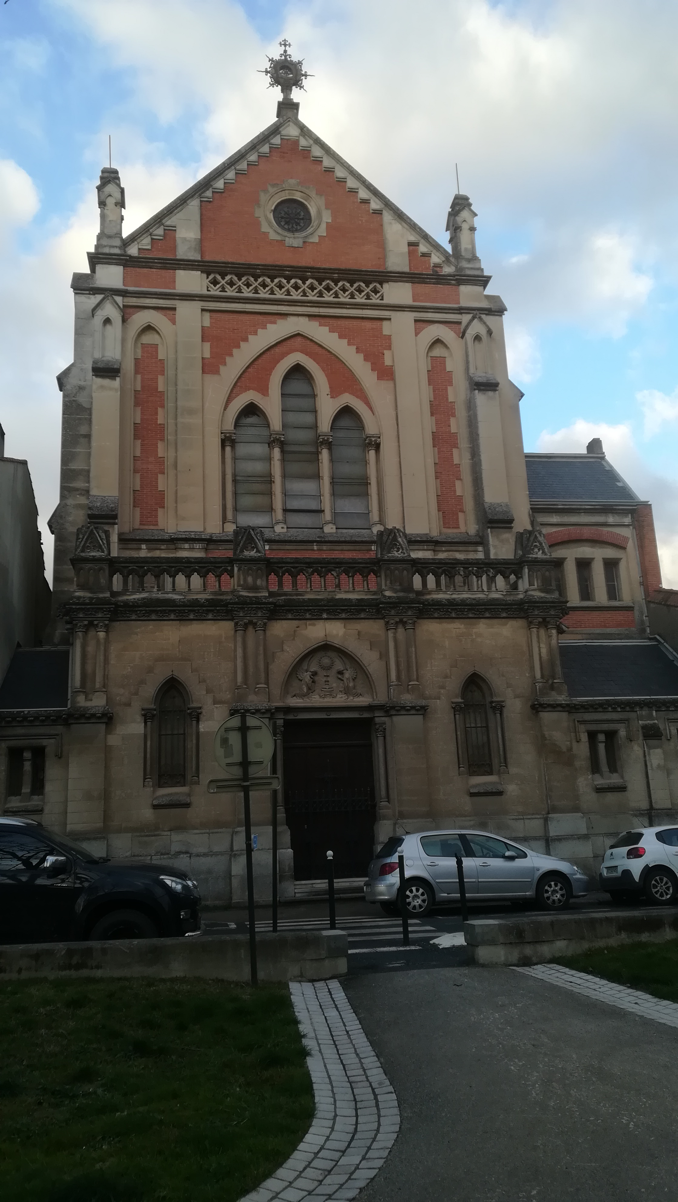 Chapelle du couvent du Saint-Sacrement à Castres, jardin du Mail